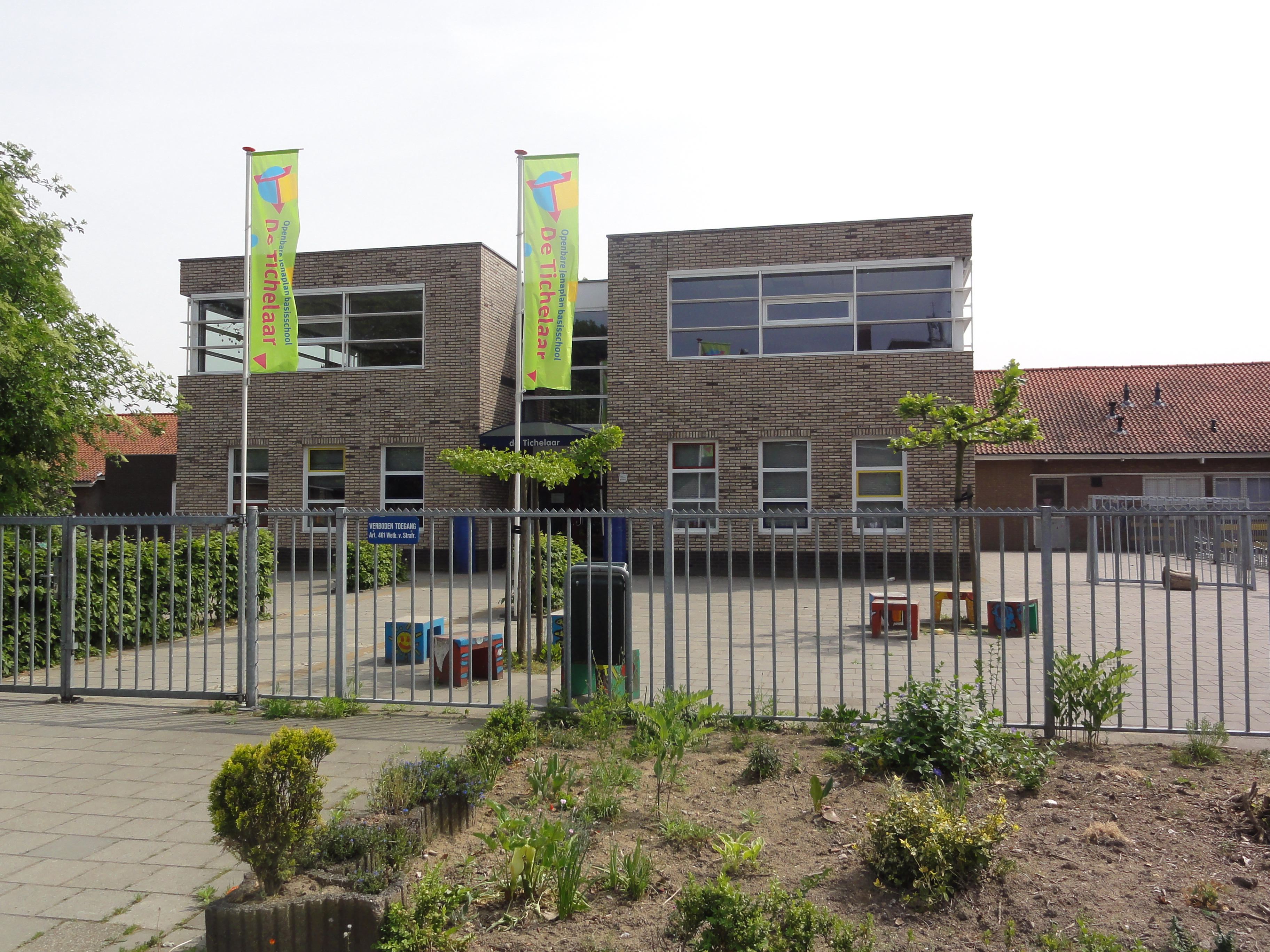 Gendt (Lingewaard) basisschool de Tichelaar